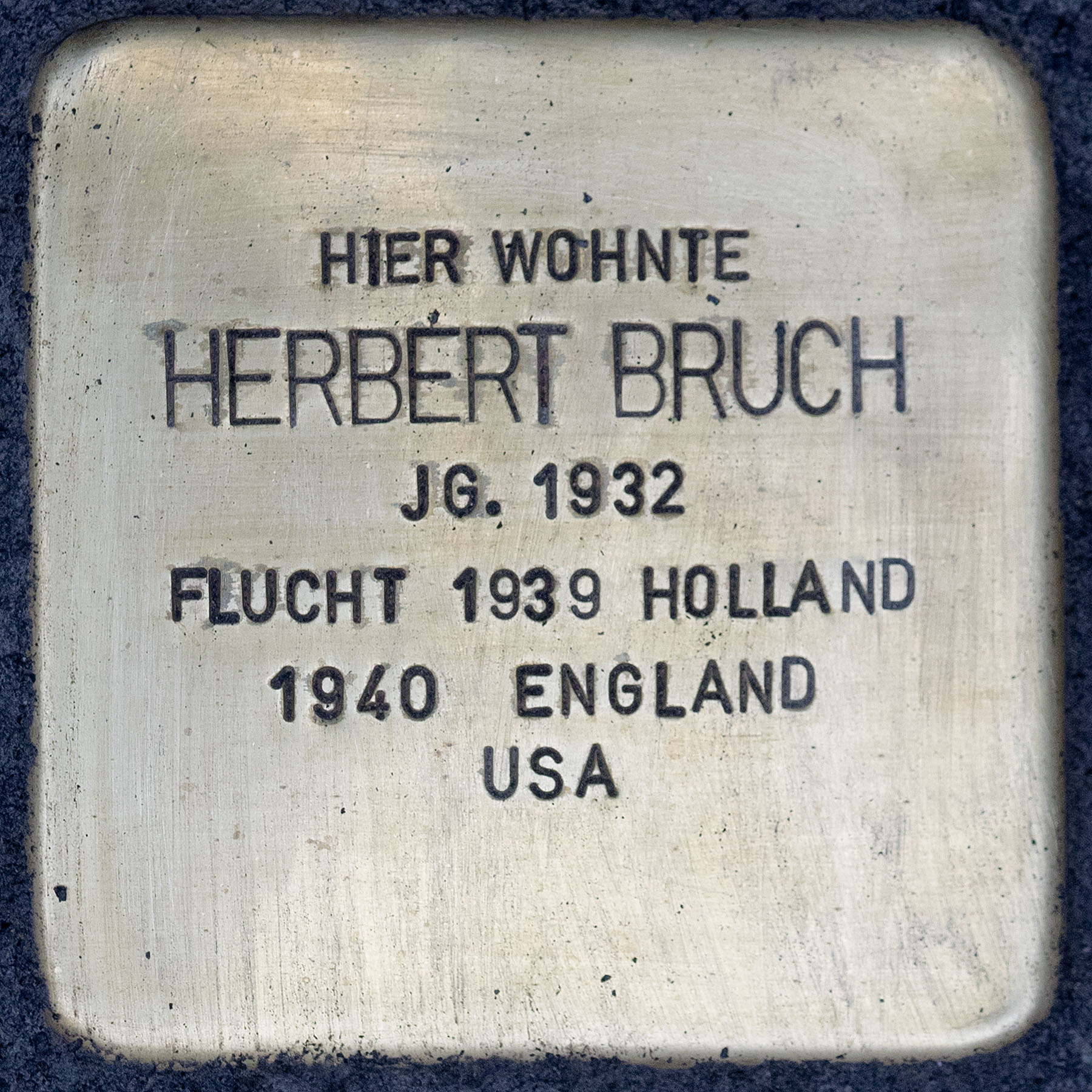 Stolpersteine Kempen: Herbert Bruch